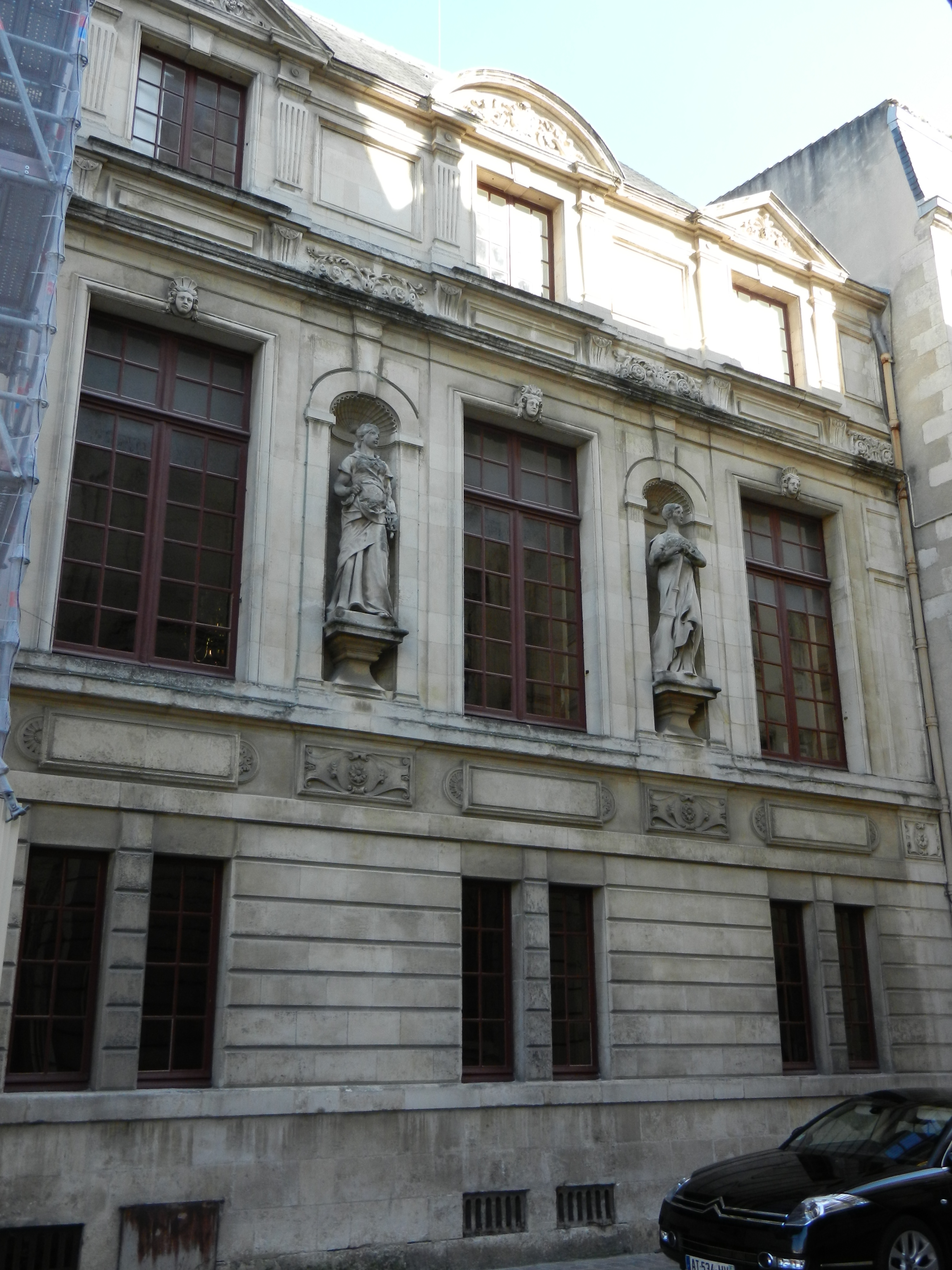 Façade, coté rue de l'hôtel de ville, de l'extension réalisée par Juste Lisch. .